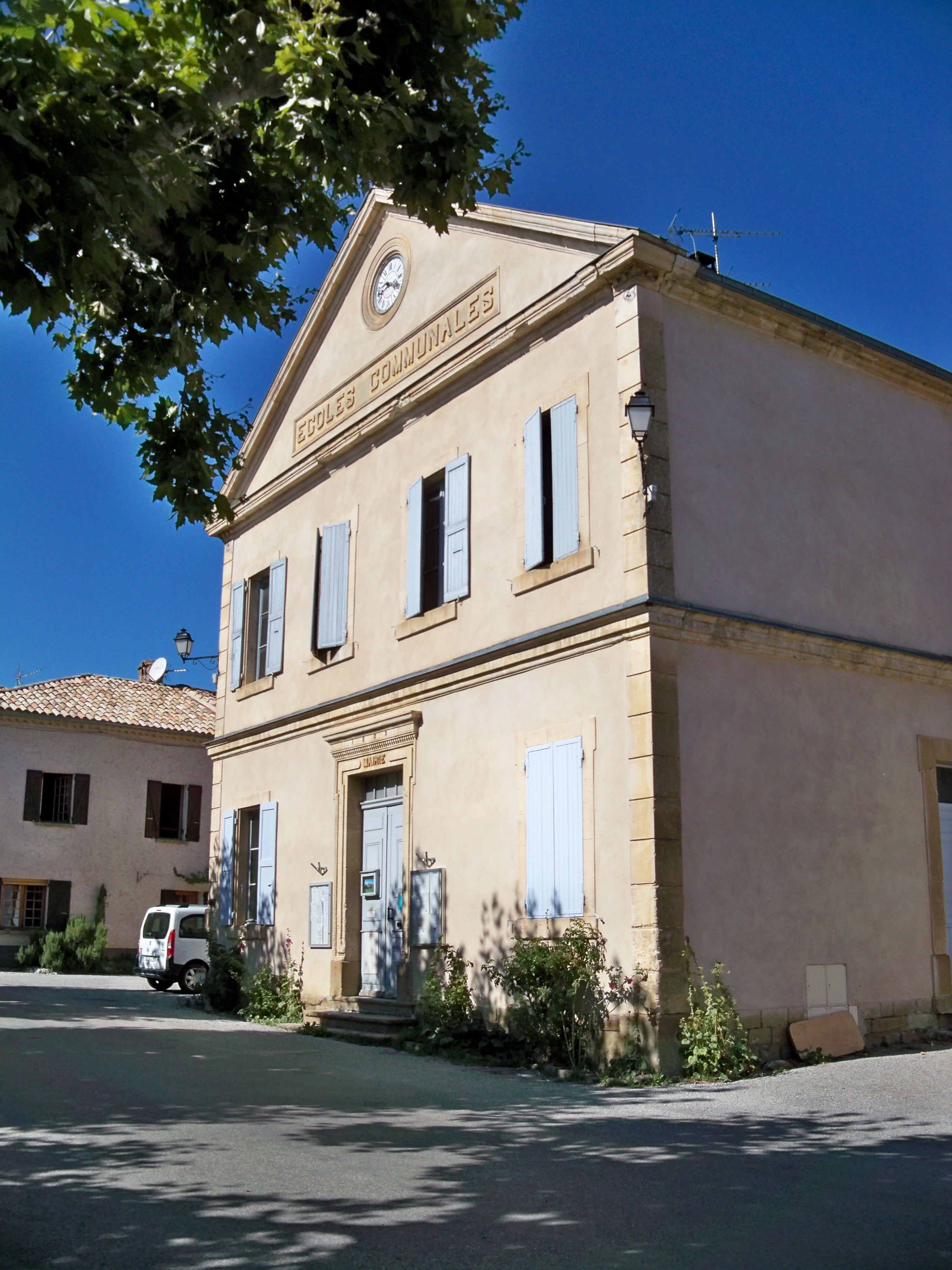 L'école communale de Saint-André-de-Rosans